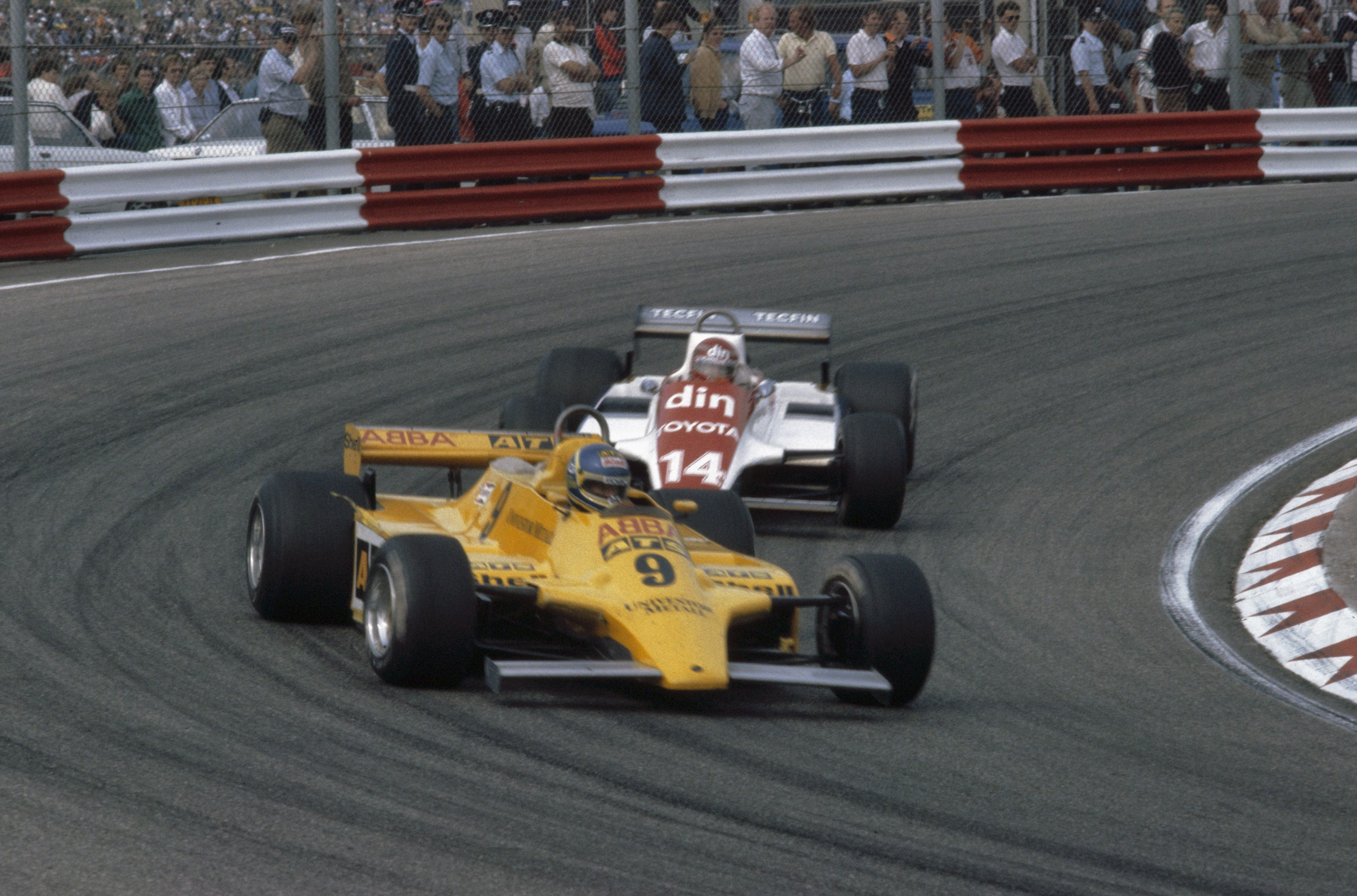 Collectie / Archief : Fotocollectie Anefo Reportage / Serie : [ onbekend ] Beschrijving : Grand Prix van NL op circuit van Zandvoort; nr. 10 , 11: officials en politie langs de kant, nr. 12 Slim Borgudd (S), voor Eliseo Salazar Datum : 30 augustus 1981 Locatie : Noord-Holland, Zandvoort Trefwoorden : autoraces Persoonsnaam : Eliseo Salazar Fotograaf : Dijk, Hans van / Anefo Auteursrechthebbende : Nationaal Archief Materiaalsoort : Dia (kleur) Nummer archiefinventaris : bekijk toegang 2.24.01.06 Bestanddeelnummer : 253-8581